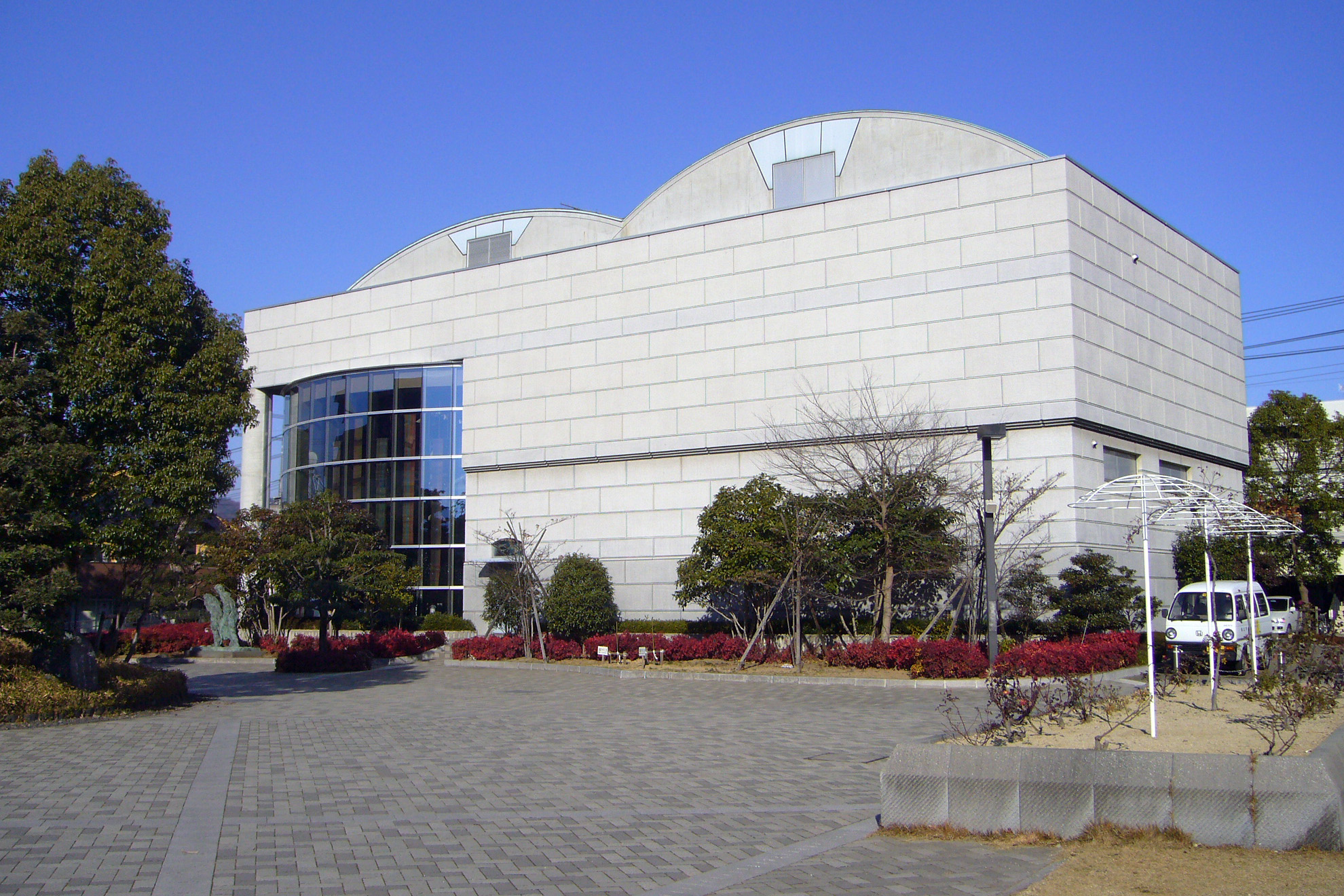 Fukuyama-shi jinken-heiwa shiryokan in Fukuyama, Hiroshima prefecture, Japan